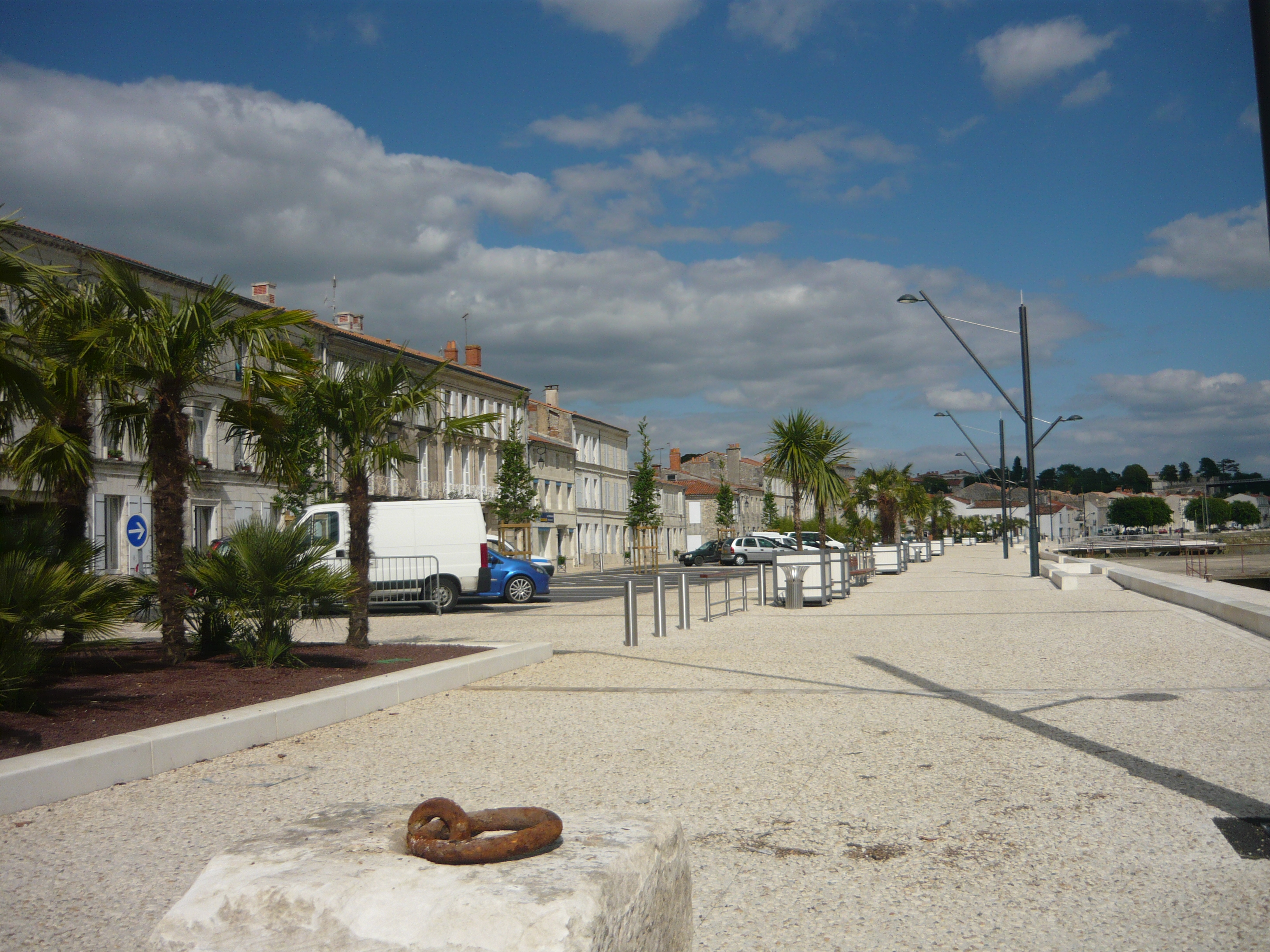 Le nouvel aménagement des bords de la Charente à Tonnay-Charente en vue d'en faire une Croisette du XXIe siècle.